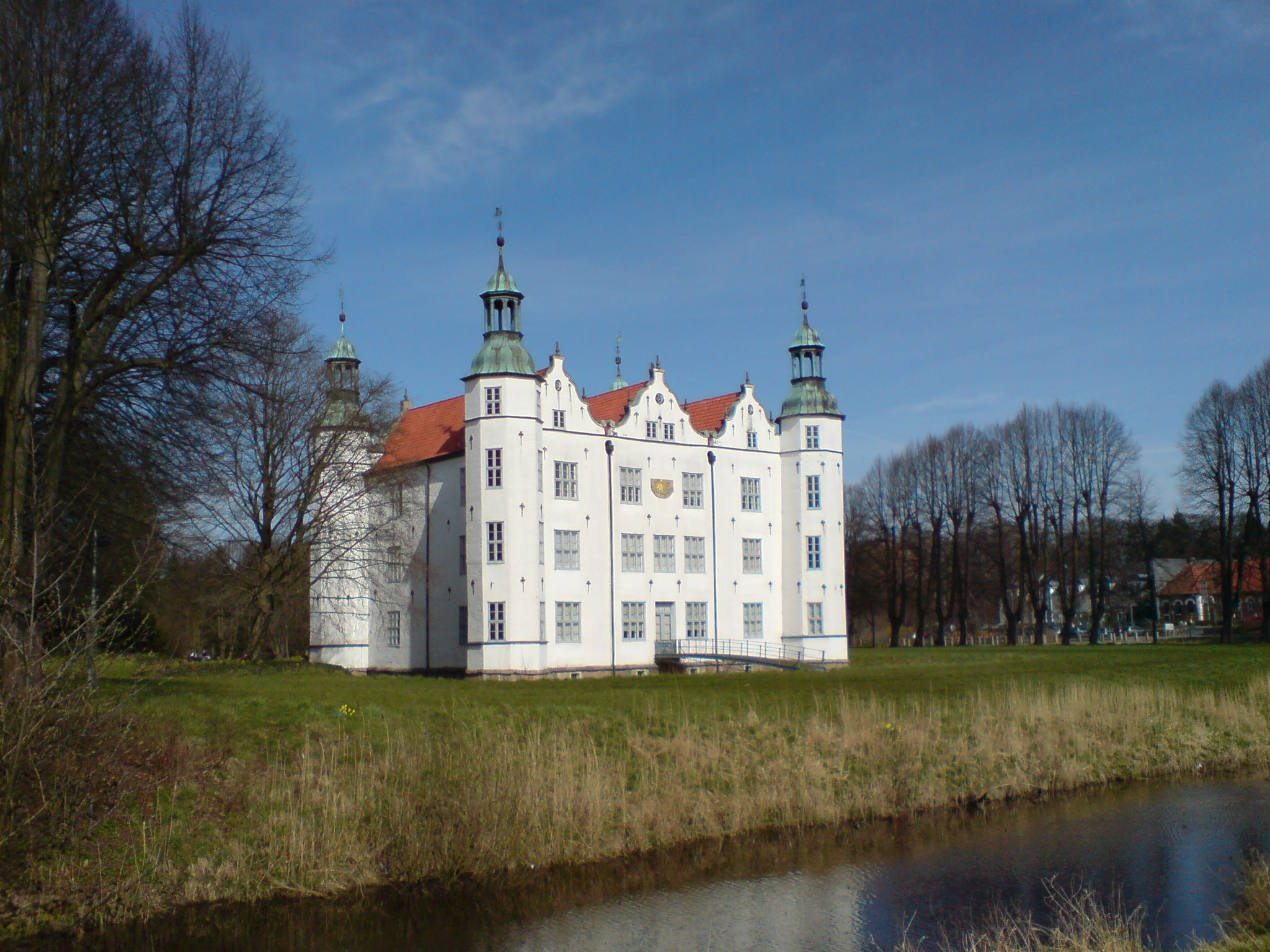 Schloss Ahrensburg, Gartenfassade